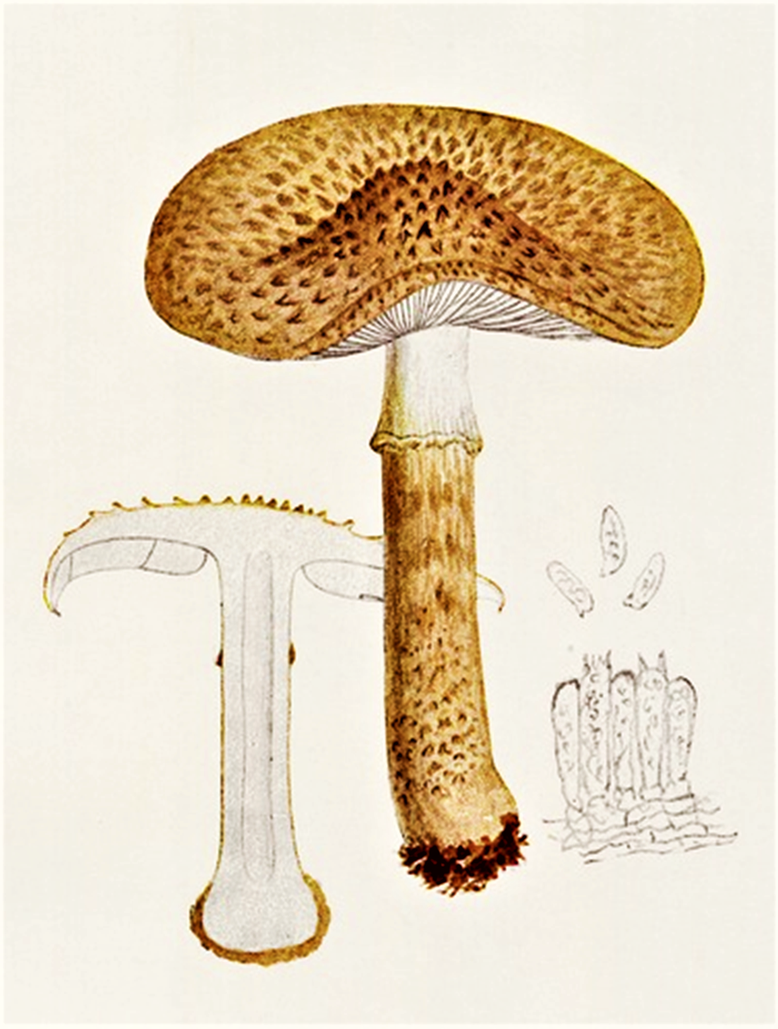 Giacomo Bresadola: Lepiota friesii Lasch (1828) heute Lepiota aspera (Pers. (1793), Quélet. (1886) sin. Echinoderma asperum (Pers.) Bon (1991)